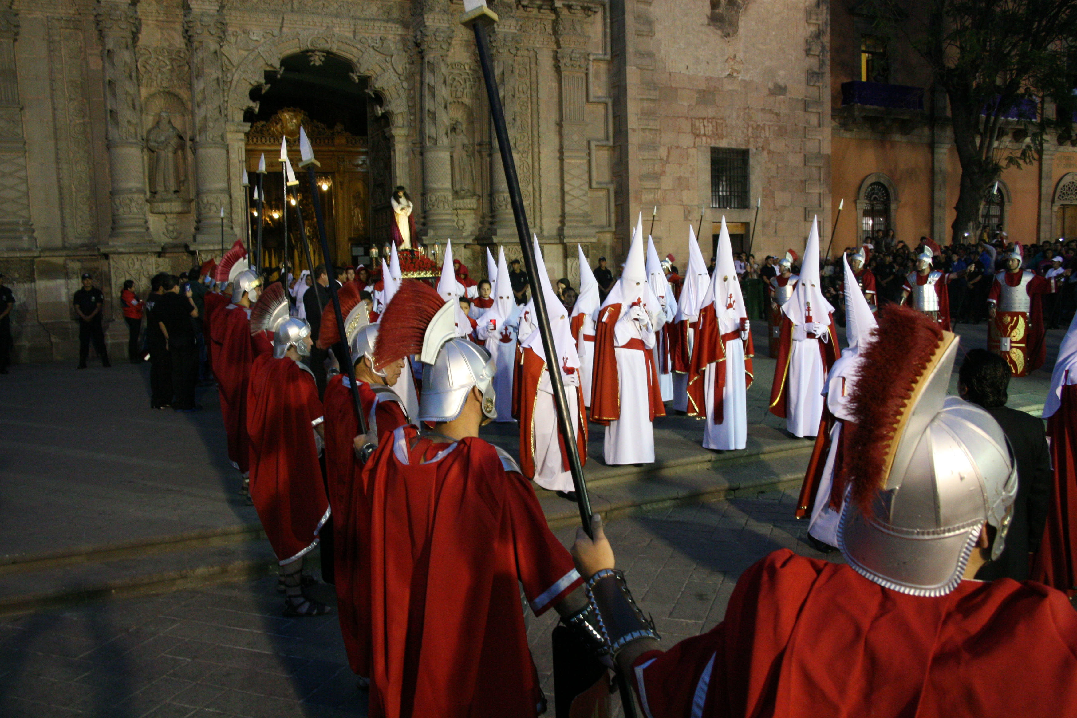 Cofrades salen del Templo en la Plaza del Carmen en San Luis Potosí México